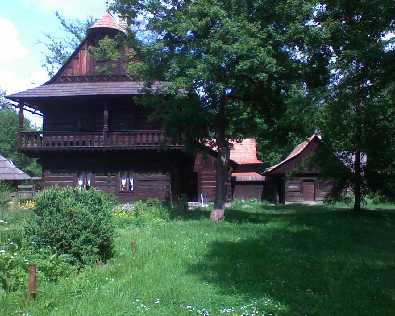 Kopiaĵo de konstruaĵo el la jaro 1793. Loĝejo de la plej riĉa kamparano, reprezentanto de senjoraro en vilaĝo. Granda ĉambro en teretaĝo servis kiel loĝoĉambro, samtempe kunvenadis en ĝi subuloj dum dividado de laboro. Ankaŭ oni ĉi tie kranis bieron kaj okazis dancamuzojn. La etaĝo devene servis kiel ĉambroj por rezervoj, sed poste ankaŭ ĝi fariĝis loĝigita.